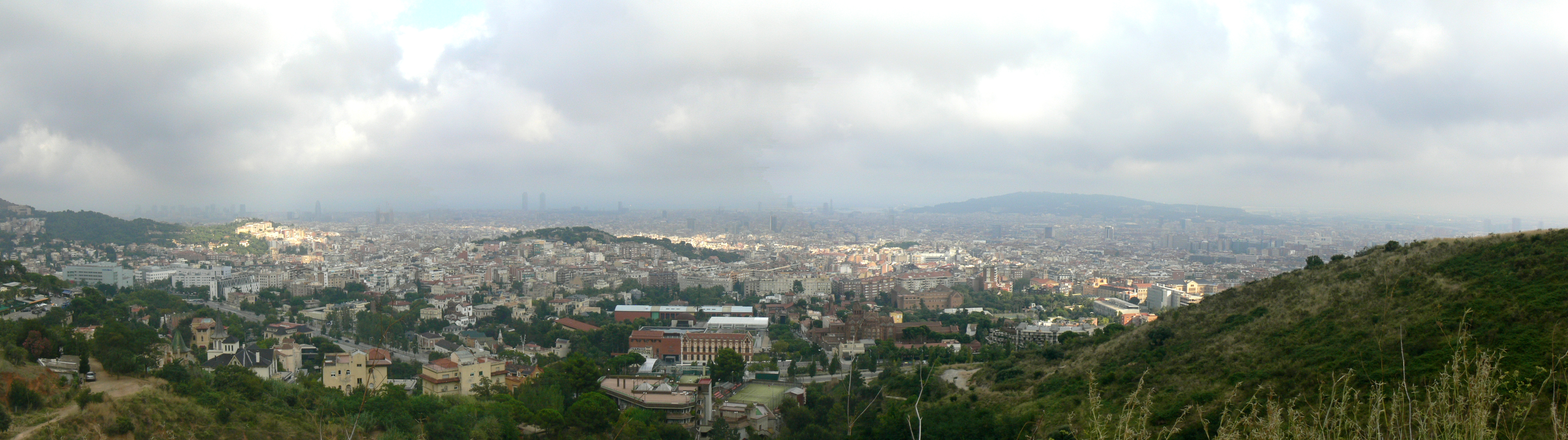 Panoràmica de Barcelona 23 d'agost de 2011